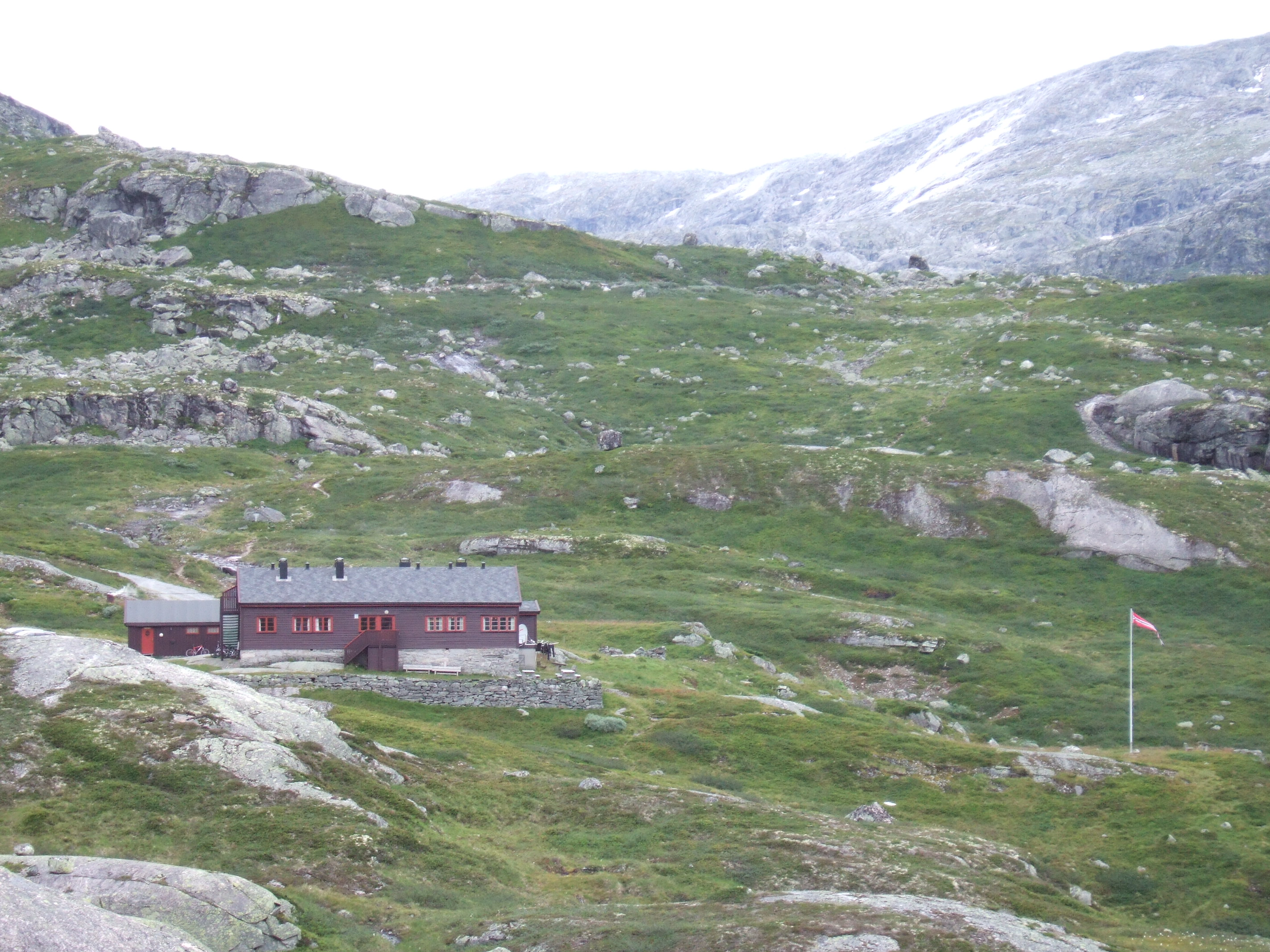 Nørdstedalseter i Breheimen sommeren 2013. DNT turisthytte.